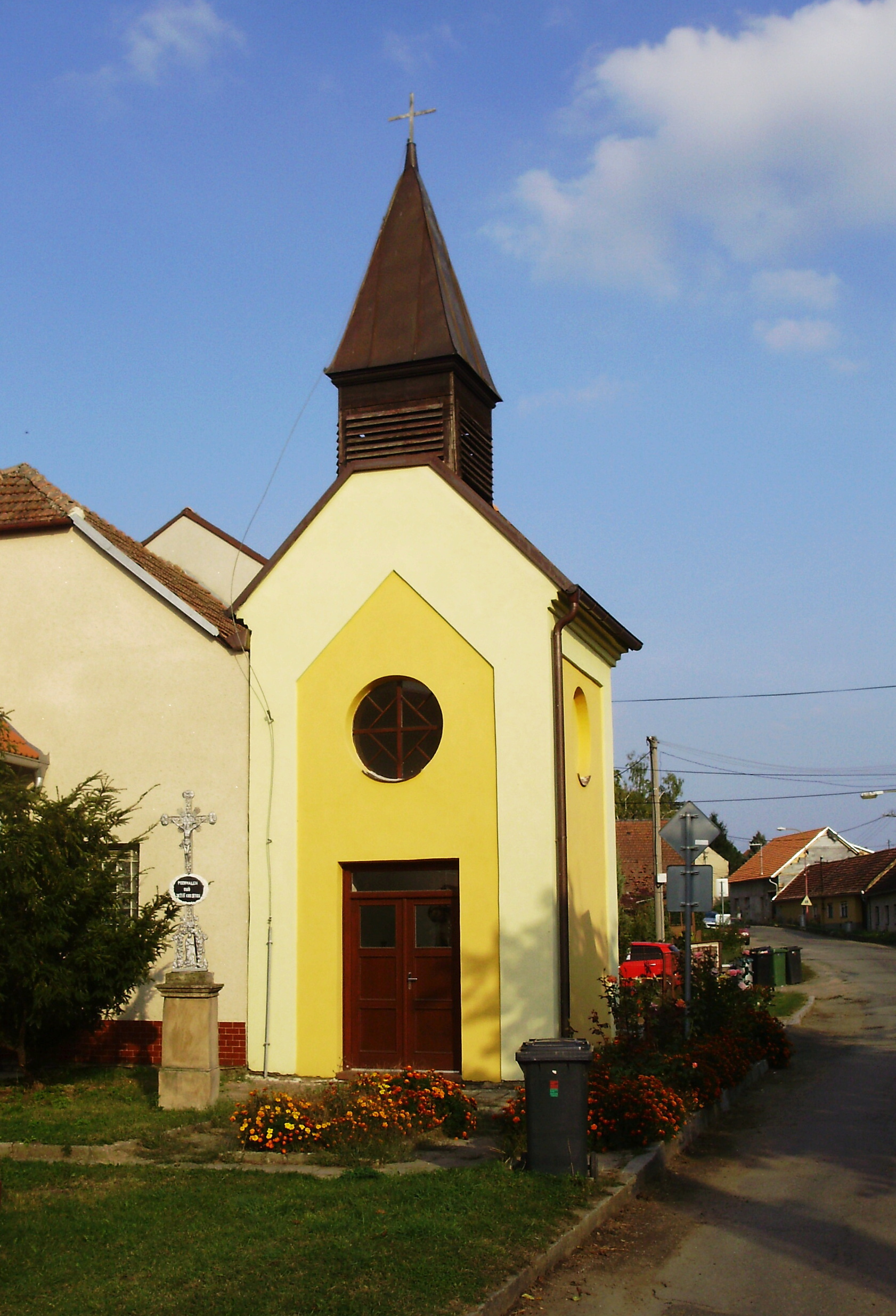 Kaplička Kojátky (Vyškov-(Bučovice)- Czech republic)